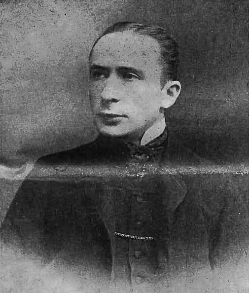 Ludwik Fritsche (-1905)